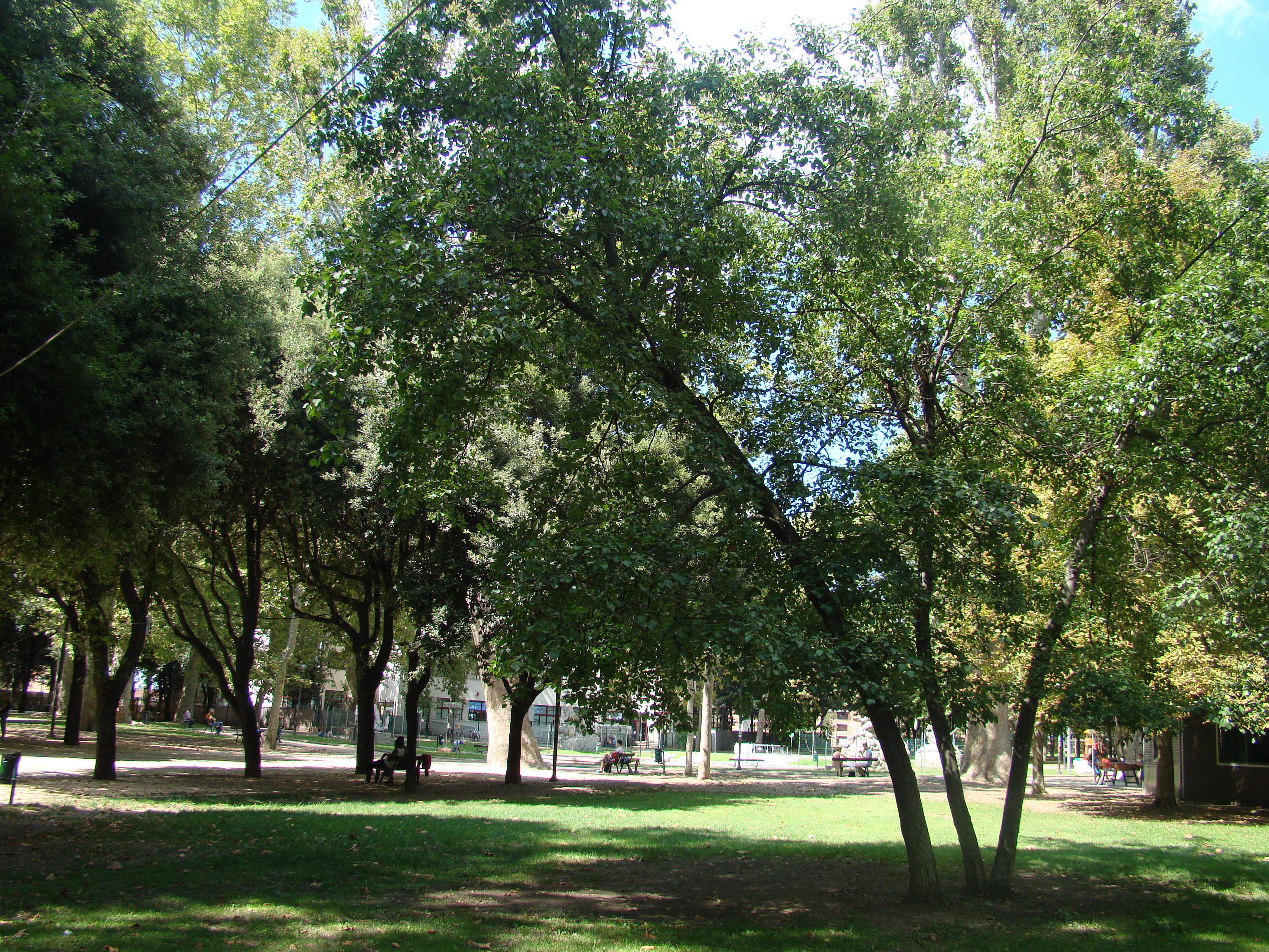 Parco della Montagnola This is a photo of a monument which is part of cultural heritage of Italy.